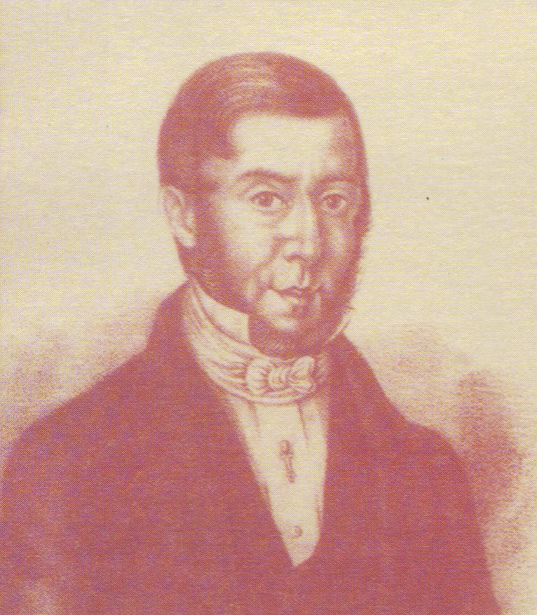 Retrato de Santiago Vazquez (1787 - 1847), político y diplomático uruguayo.